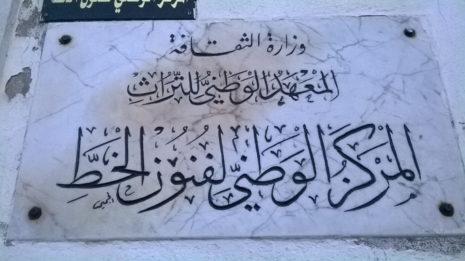 El Halfaouine, Bab Souika , Tunis الحلفاوين, باب سويقة ، تونس